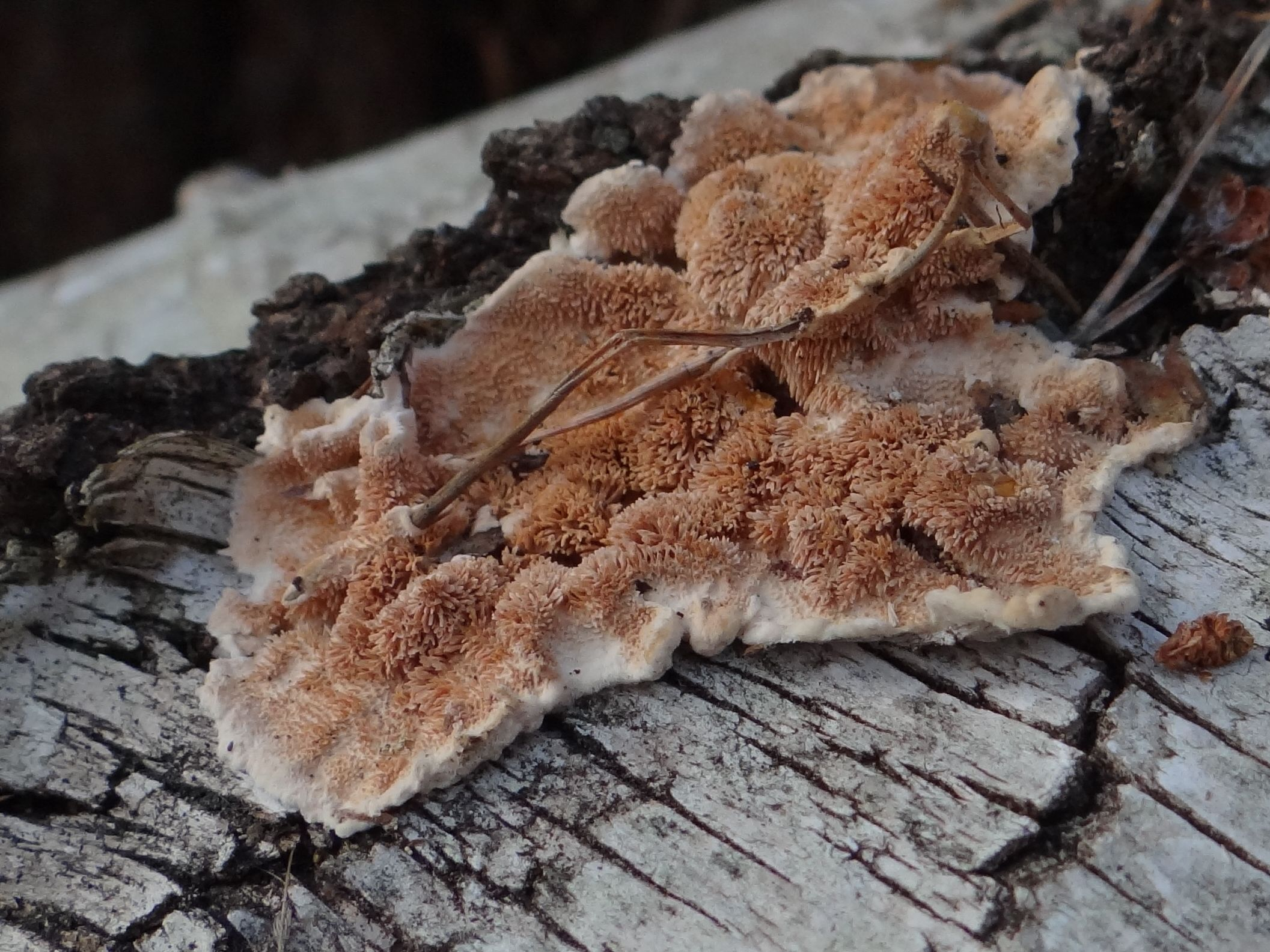 Steccherinum ochraceum